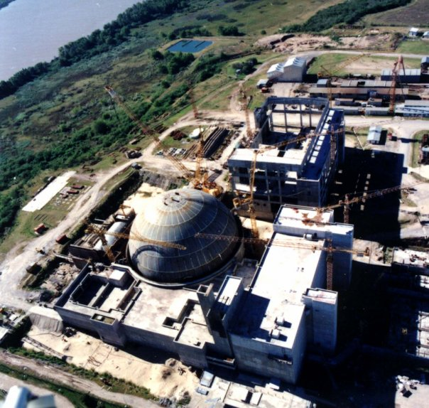 Obra CNA II